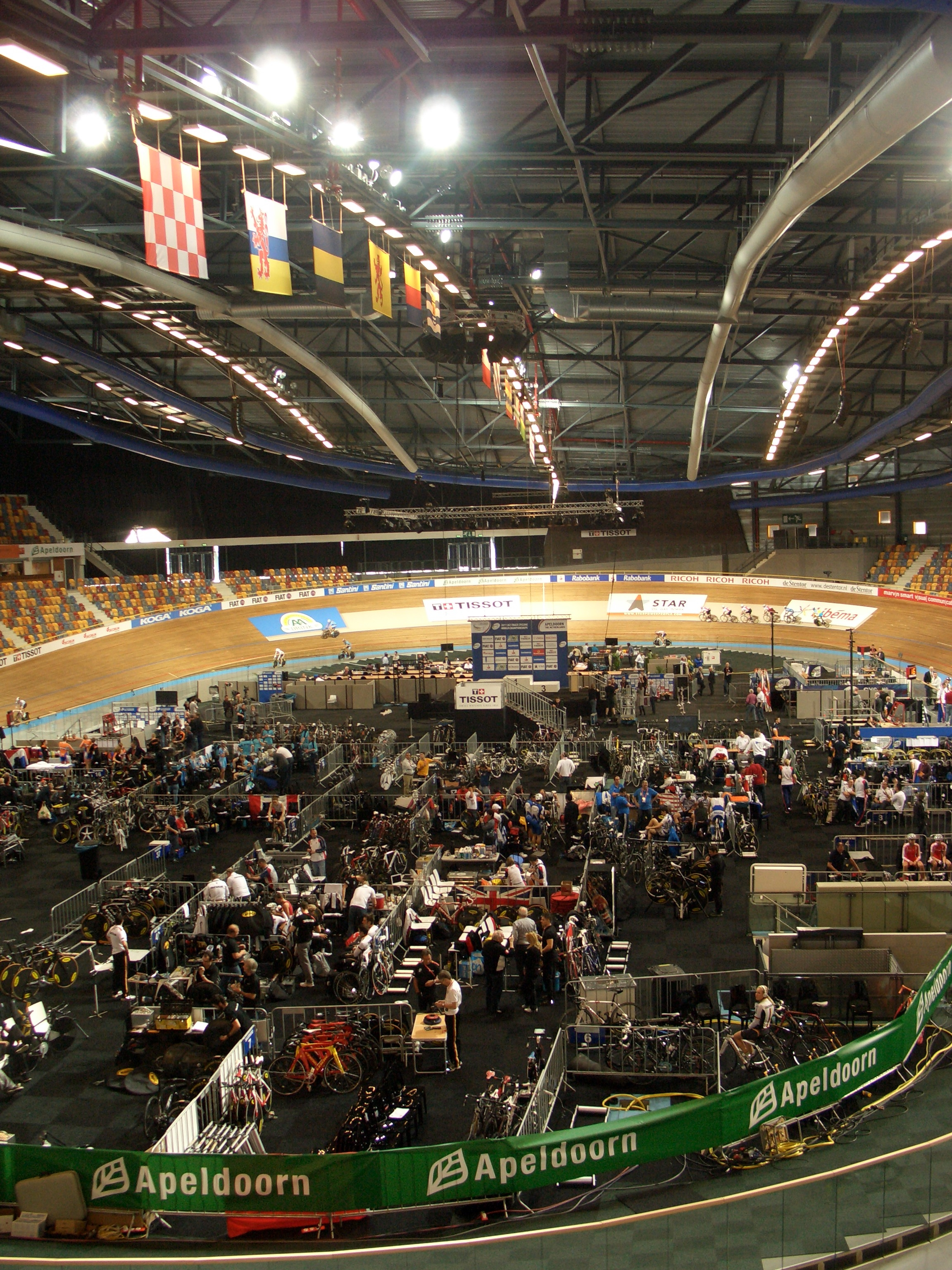 Die Omnisport-Halle in Apeldoorn, Bahn-WM 2011, vor Beginn